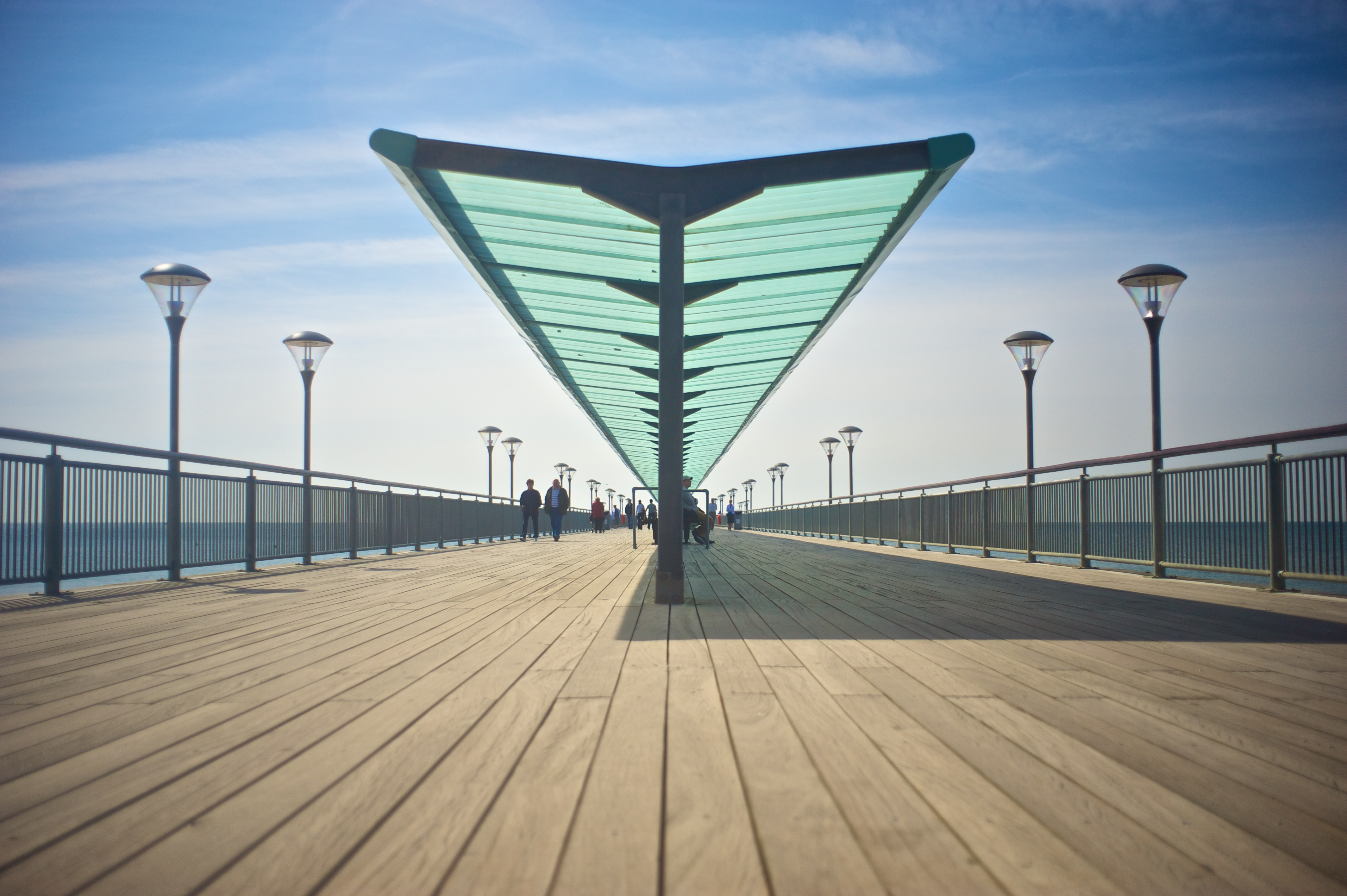 Boscombe Pier